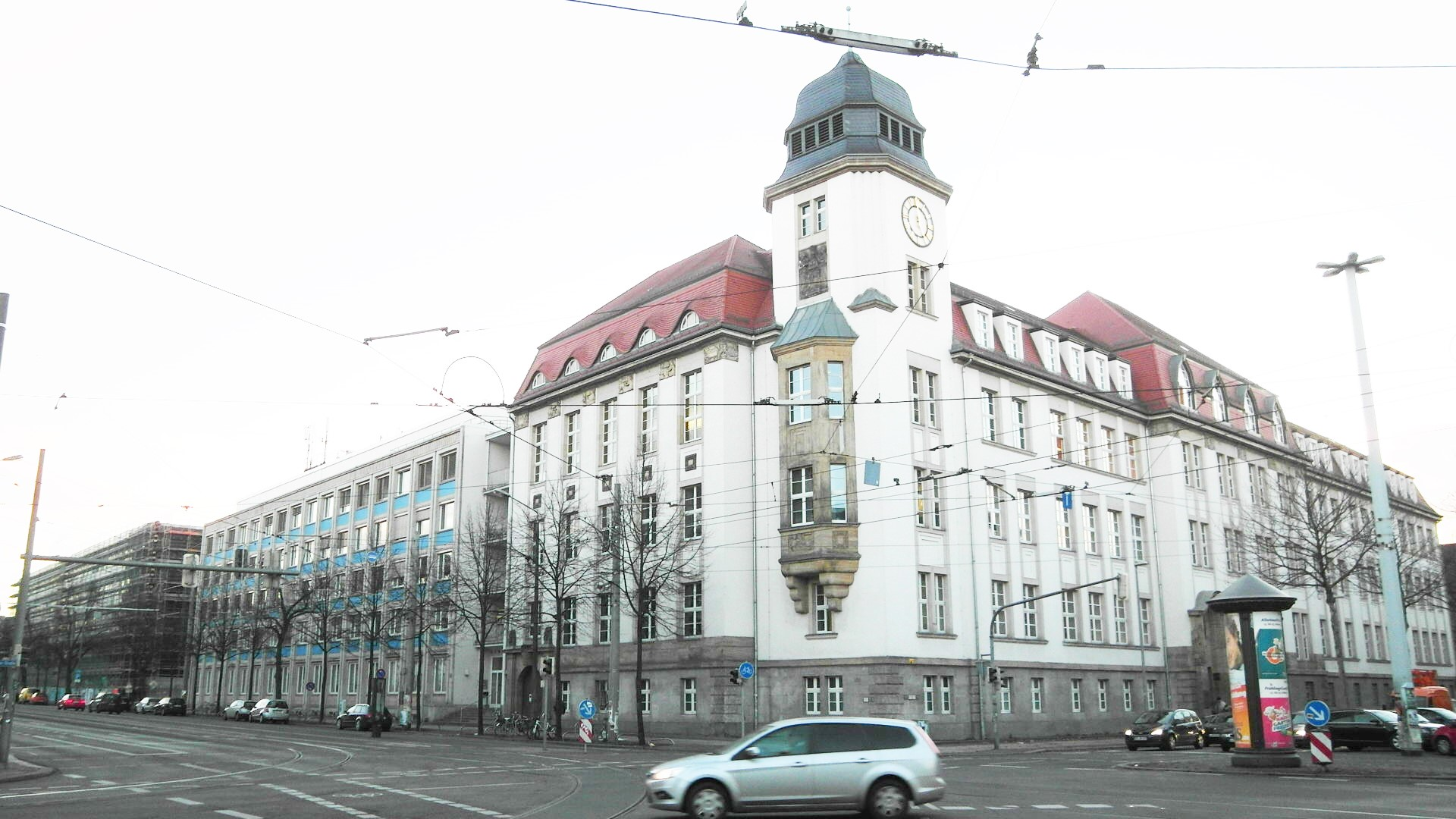 Hochschulgebäude